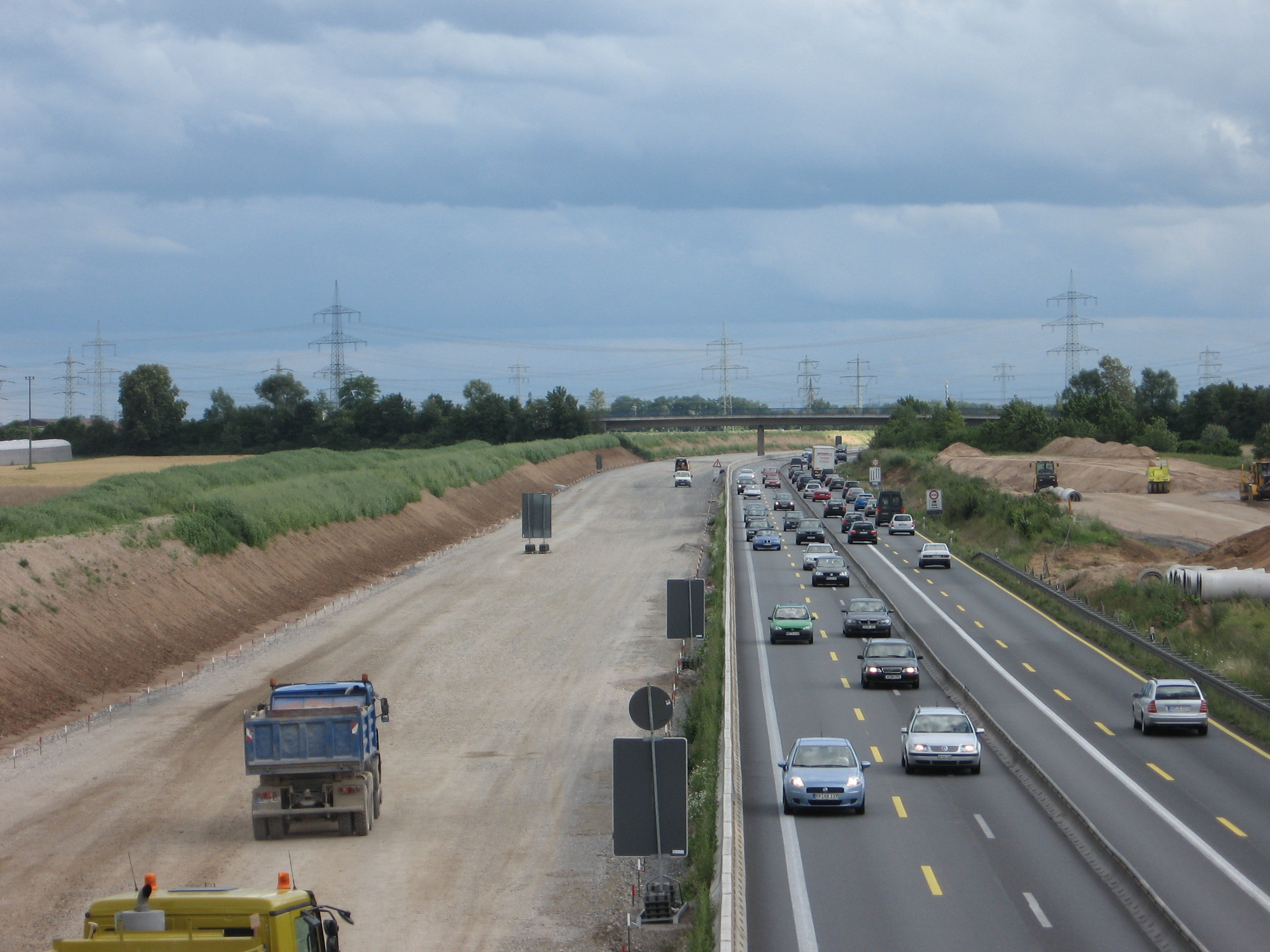 4+0-Verkehr nach RSA: eine Möglichkeit der Verkehrsführung im Baustellenbereich